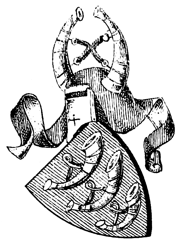 Wappen der von Neifen (Neuffen)